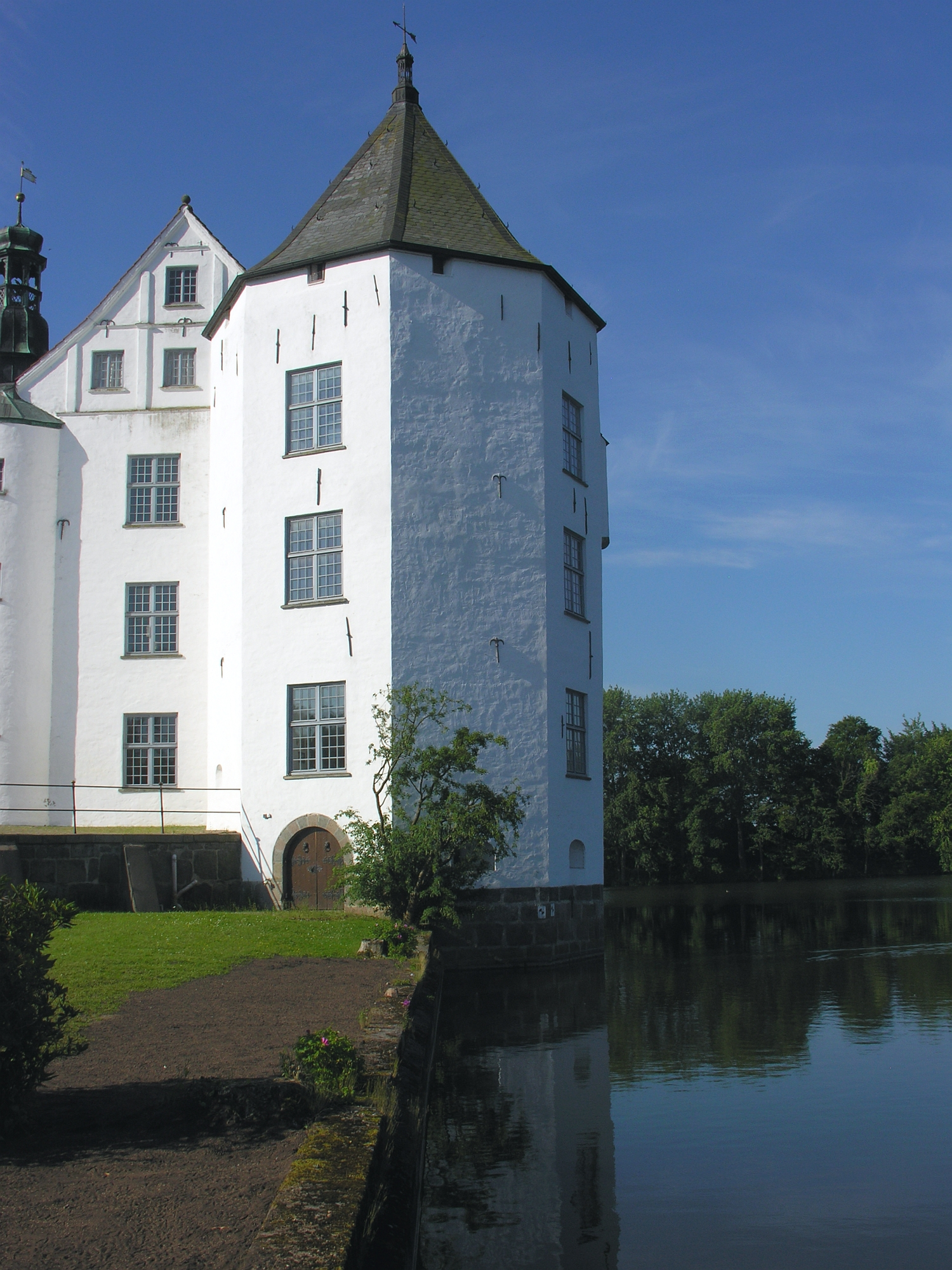 Kulturdenkmal Schloss Glücksburg 4.1i Wasserschlossanlage Nordwestseite - Schleswig-Holstein - Foto 2012 Wolfgang Pehlemann Steinberg/Ostsee DSCN0230